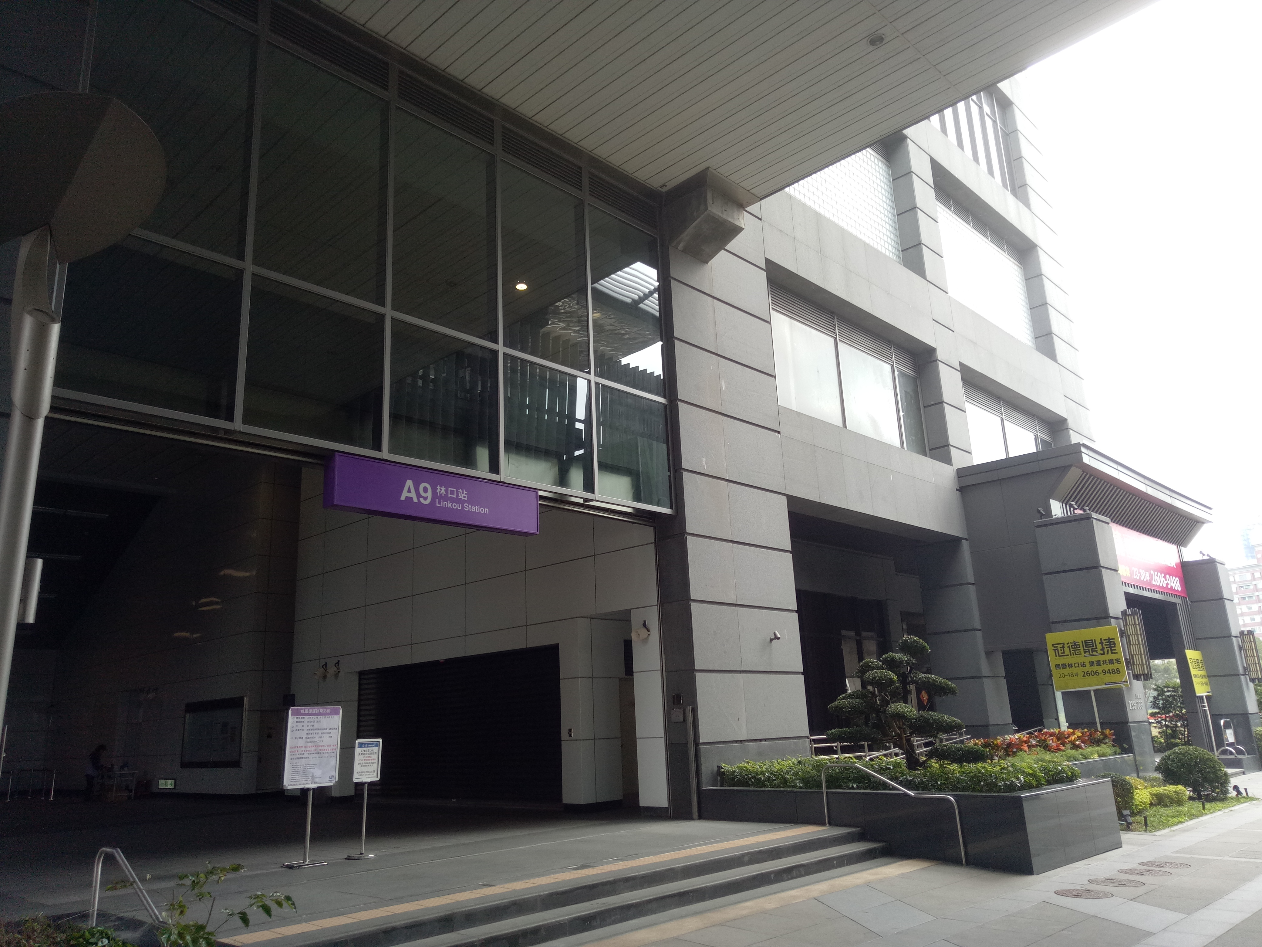 桃園捷運林口站。